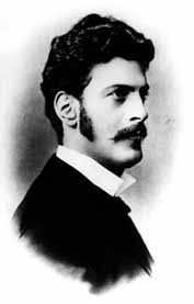 Karl Wittgenstein in his younger years (1847-1913)